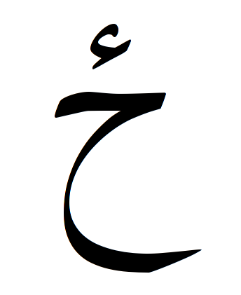 Isolierte Form des paschtunischen Buchstabens Dze